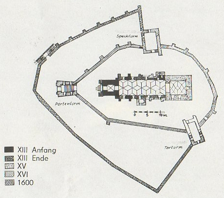 Planul fortificatiei din Movile.